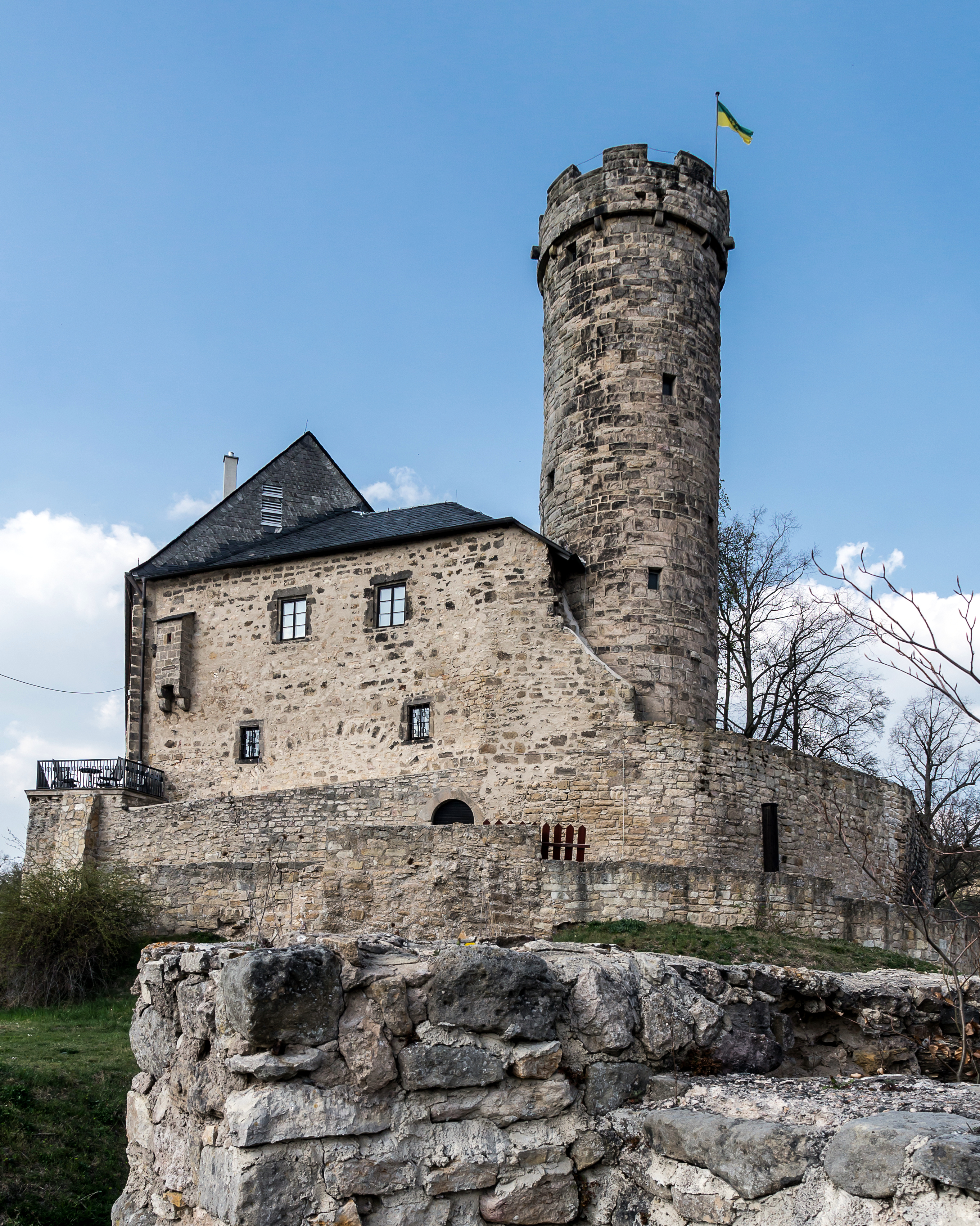 (NSG Nr. 158)Naturschutzgebiete in Thüringen Burg Greifenstein Bad Blankenburg,Südostansicht